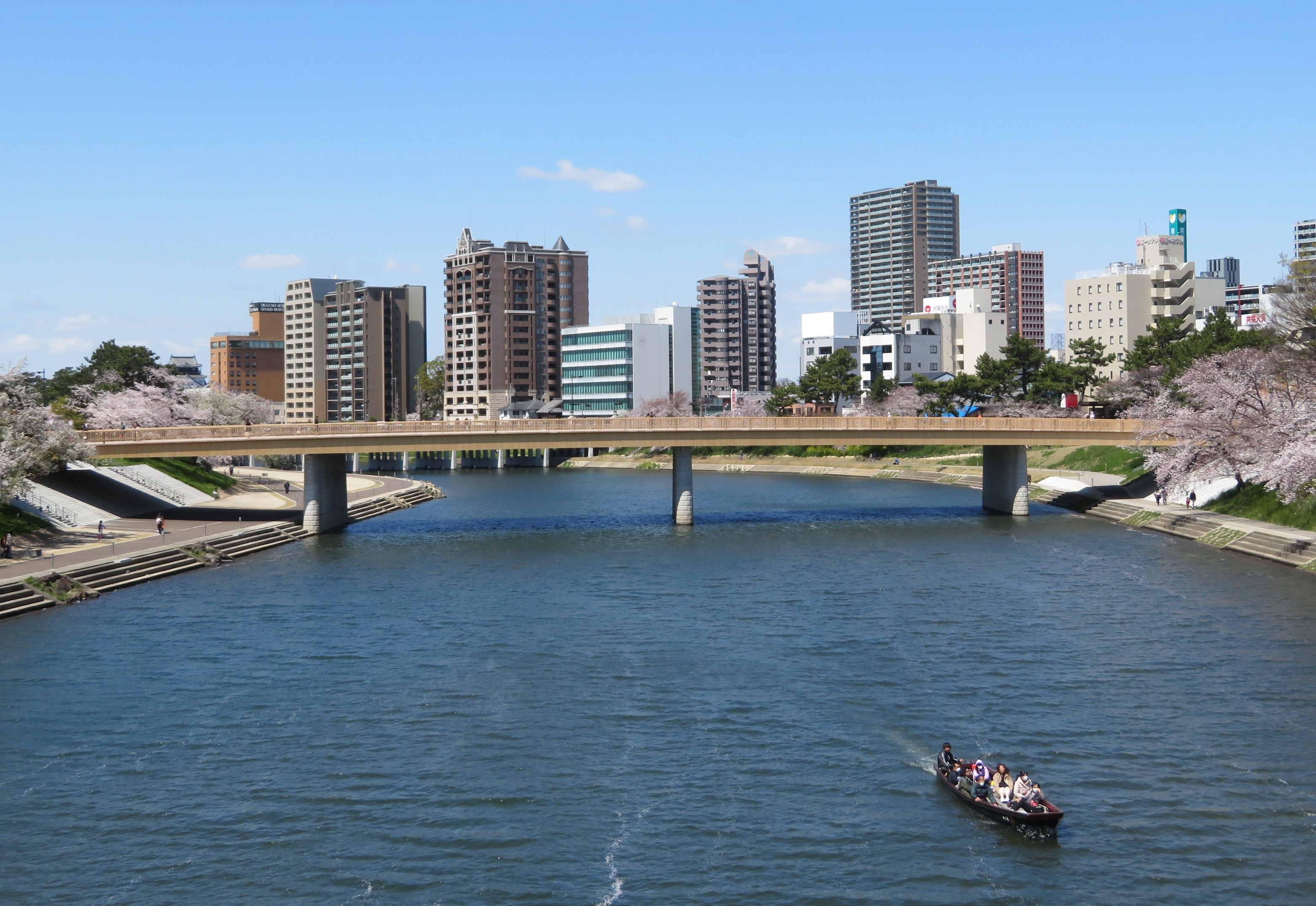 乙川と桜城橋